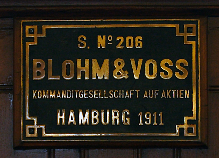 Typenschild mit Baunummer am Segelschiff Passat